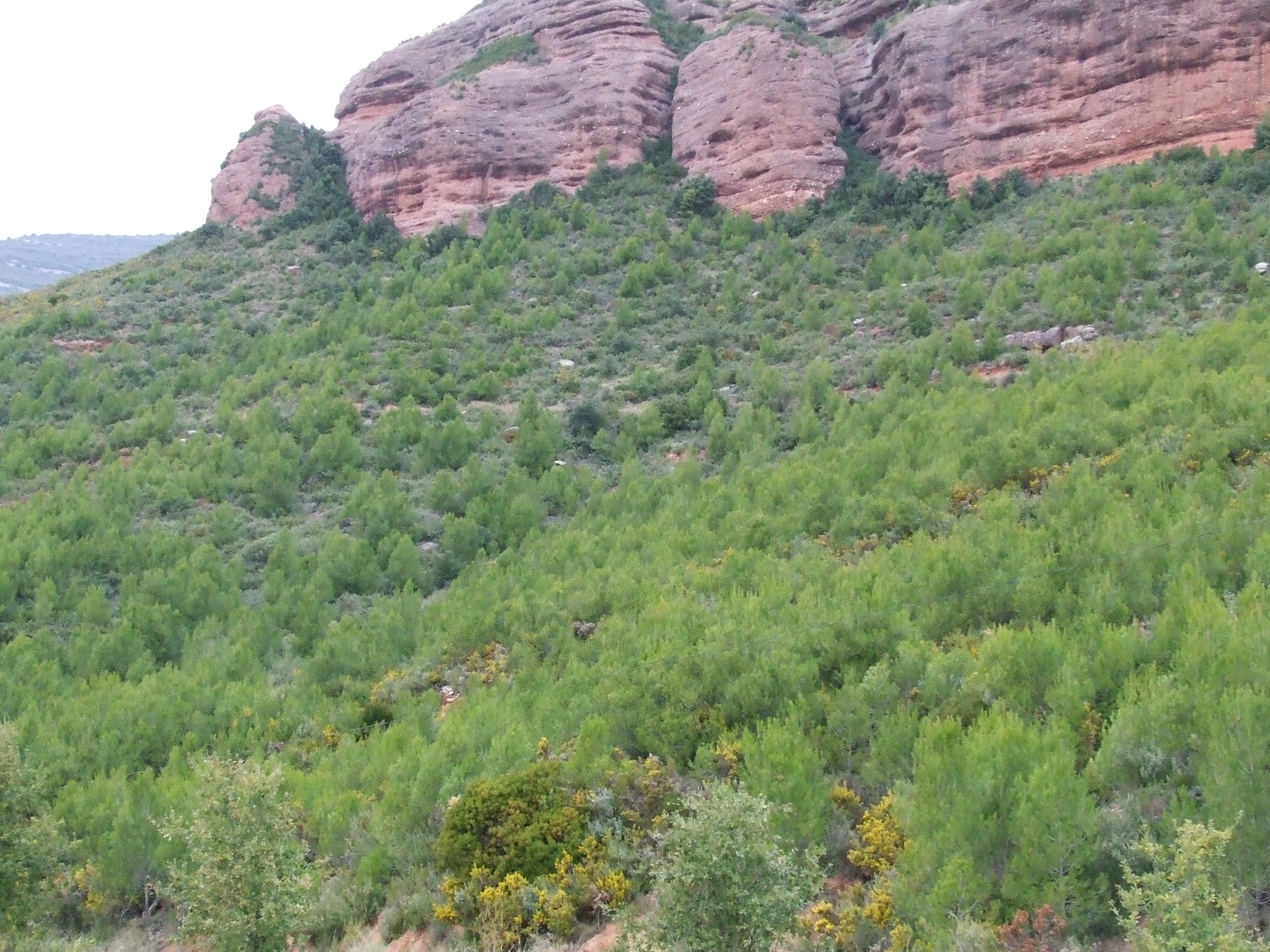 Bosc de Can Quintanes (Riells del Fai, Bigues i Riells, Vallès Oriental)